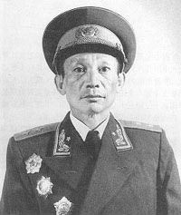 吴先恩中将1955年授衔照